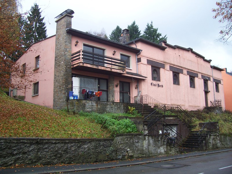 Sujet:D'Gebai vum fréiere Kino Nord Source:Eege Foto vum User:Tom Alfa